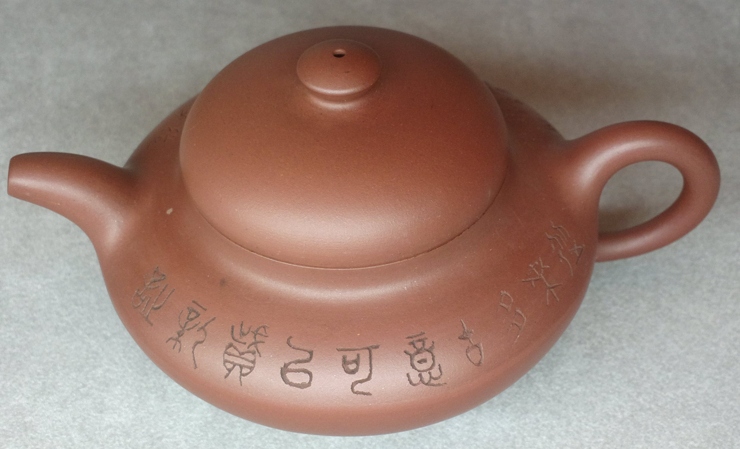 Théière Hehuan en argile de Yixing ou glaise zisha par Xu Xu. Exposition au Centre culturel de Chine à Paris du 4 au 13 septembre 2013.